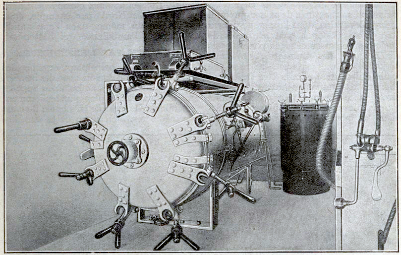 L'autoclave de l'ambulance automobile chirurgicale Marcille, dans La Science et la Vie de juin 1915, page 163